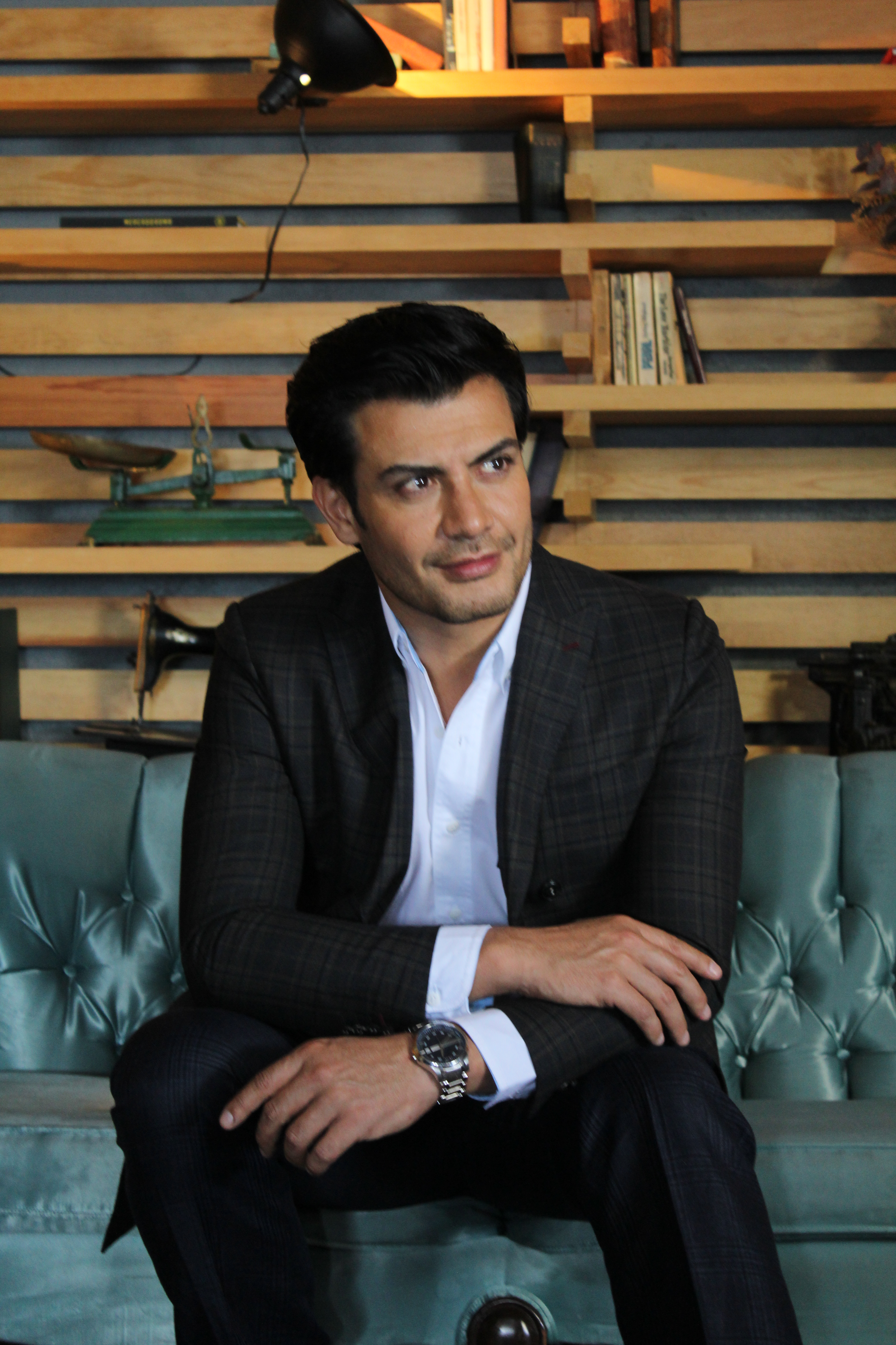 Actor Andrés Palacios en Octubre 2017